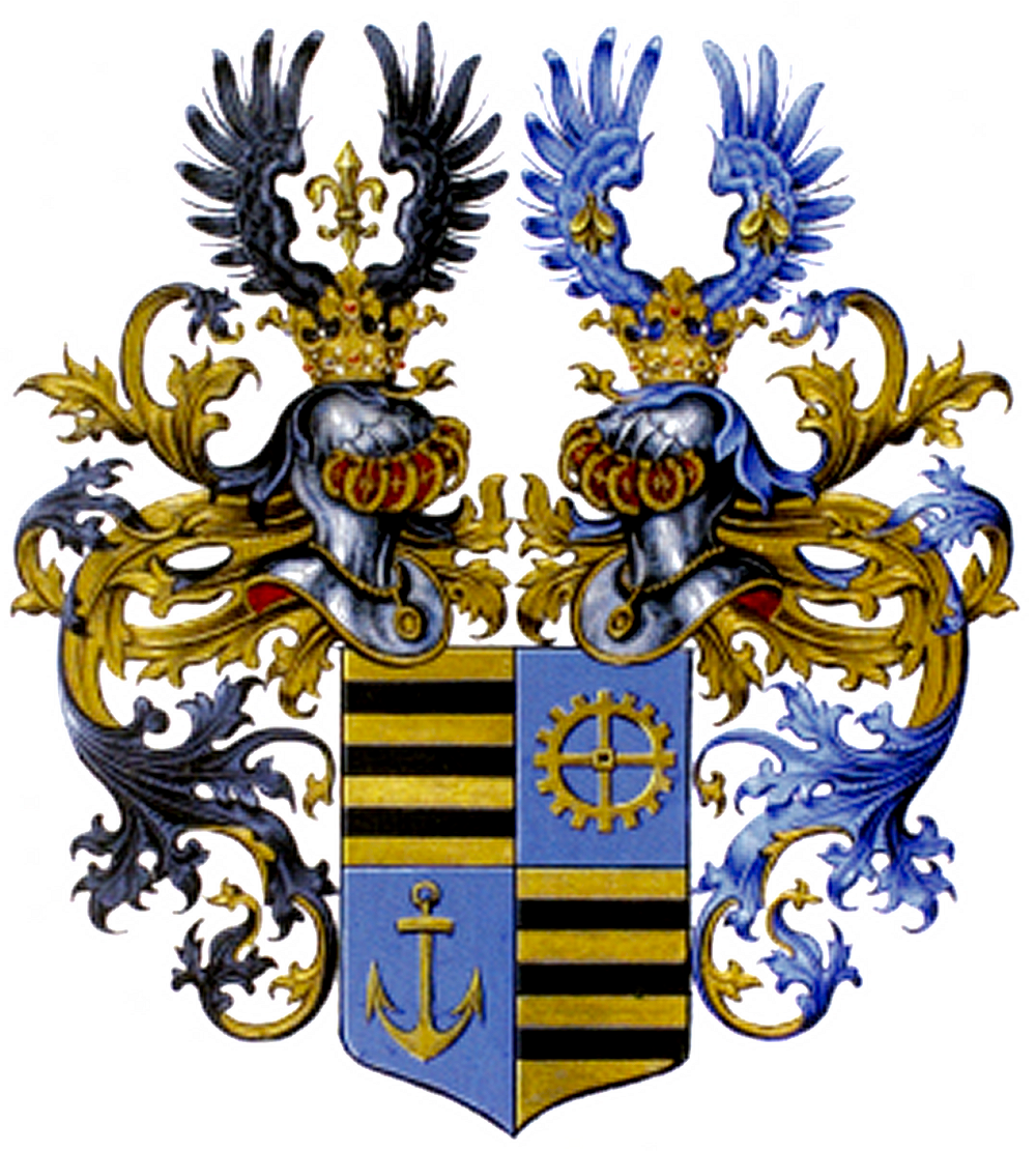 Schoeller Wappen